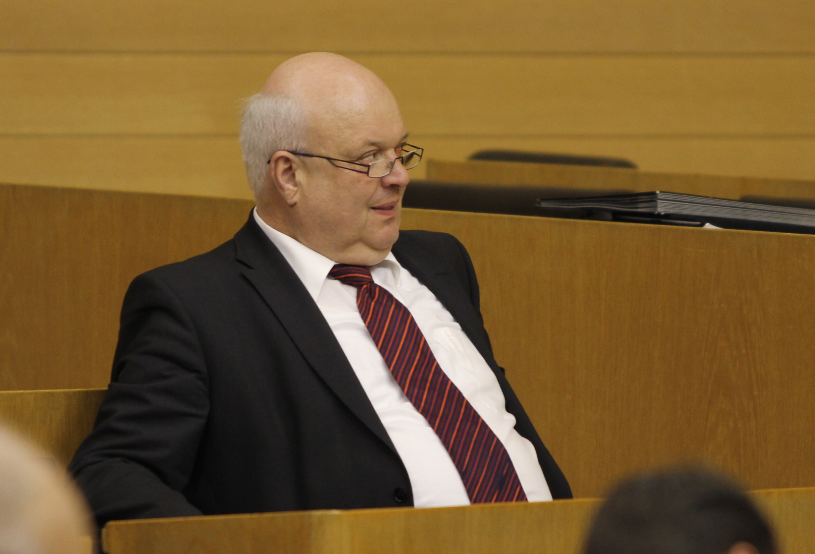 Bernd Hitzler im Plenarsaal des Landtages von Baden-Württemberg. Wikipedia im Landtag – Baden-Württemberg 15.–16. Mai 2013 in Stuttgart Fragen zur Nachnutzung Wenn Sie Fragen zur Nachnutzung dieses Bildes haben, können Sie sich jederzeit gern an wenden Personality rights warningAlthough this work is freely licensed or in the public domain, the person(s) shown may have rights that legally restrict certain re-uses unless those depicted consent to such uses. In these cases, a model release or other evidence of consent could protect you from infringement claims.